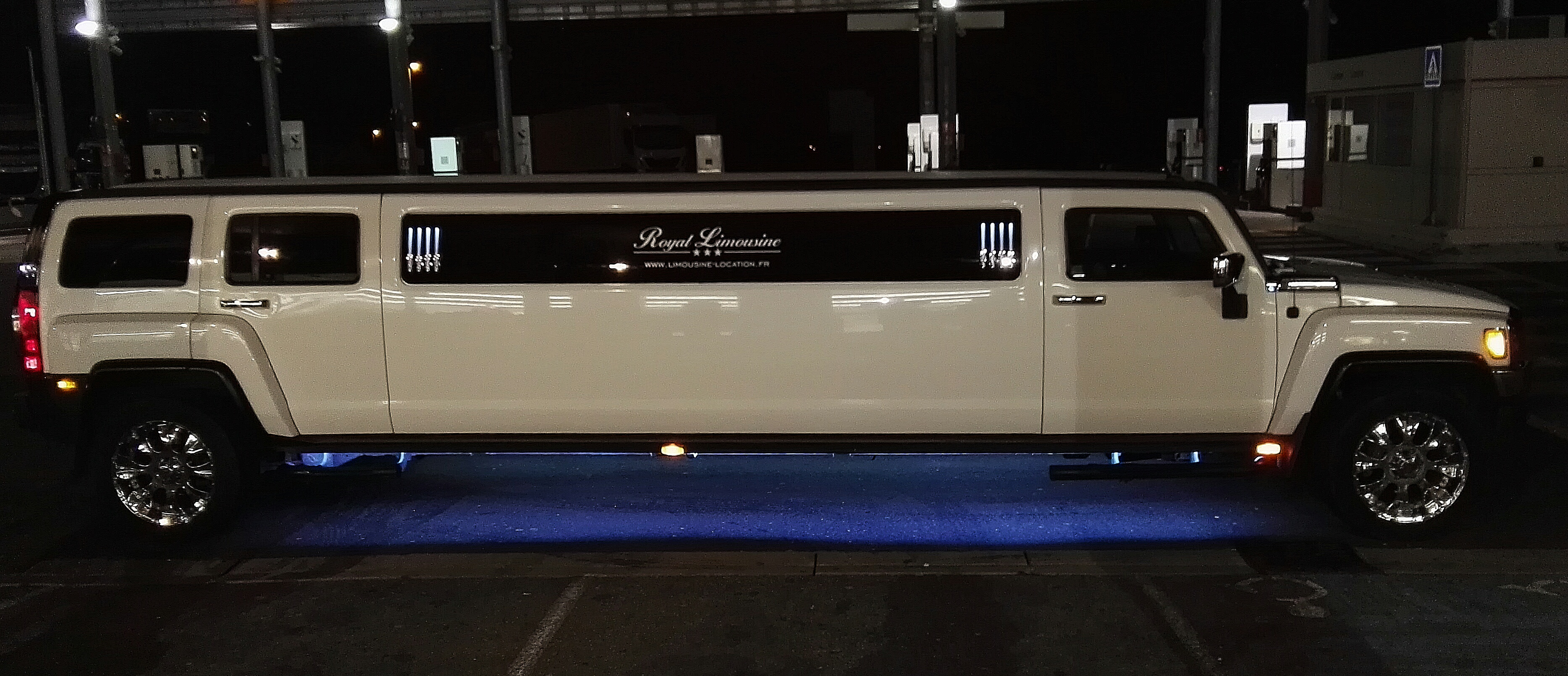 Limousine Hummer H3 de location dans le département de l'Aude, 11 mars 2017.